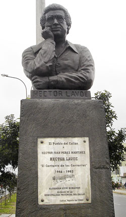 Héctor Lavoen patsas.